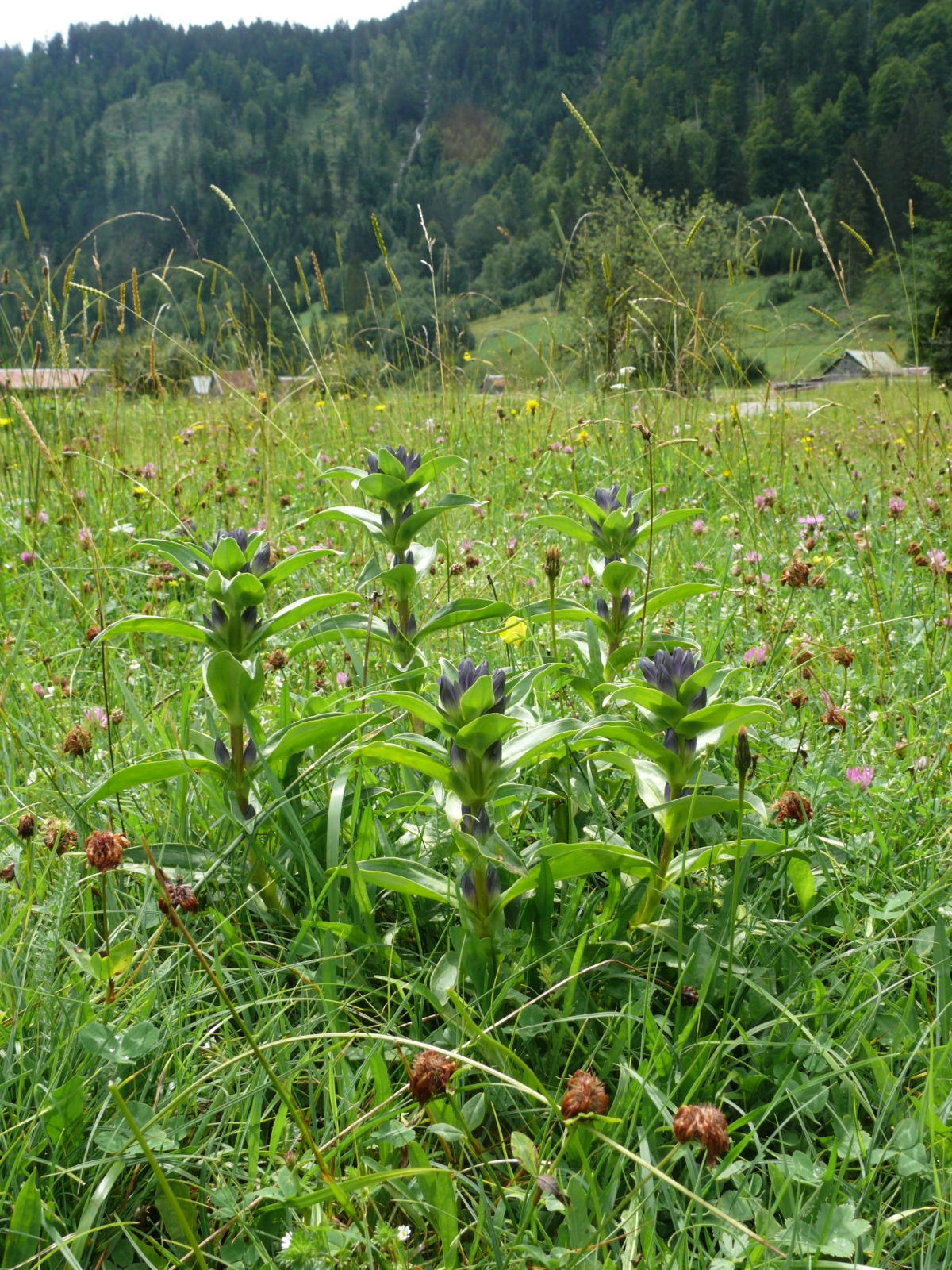 Gentiana cruciata, Allgäuer Alpen, Germany